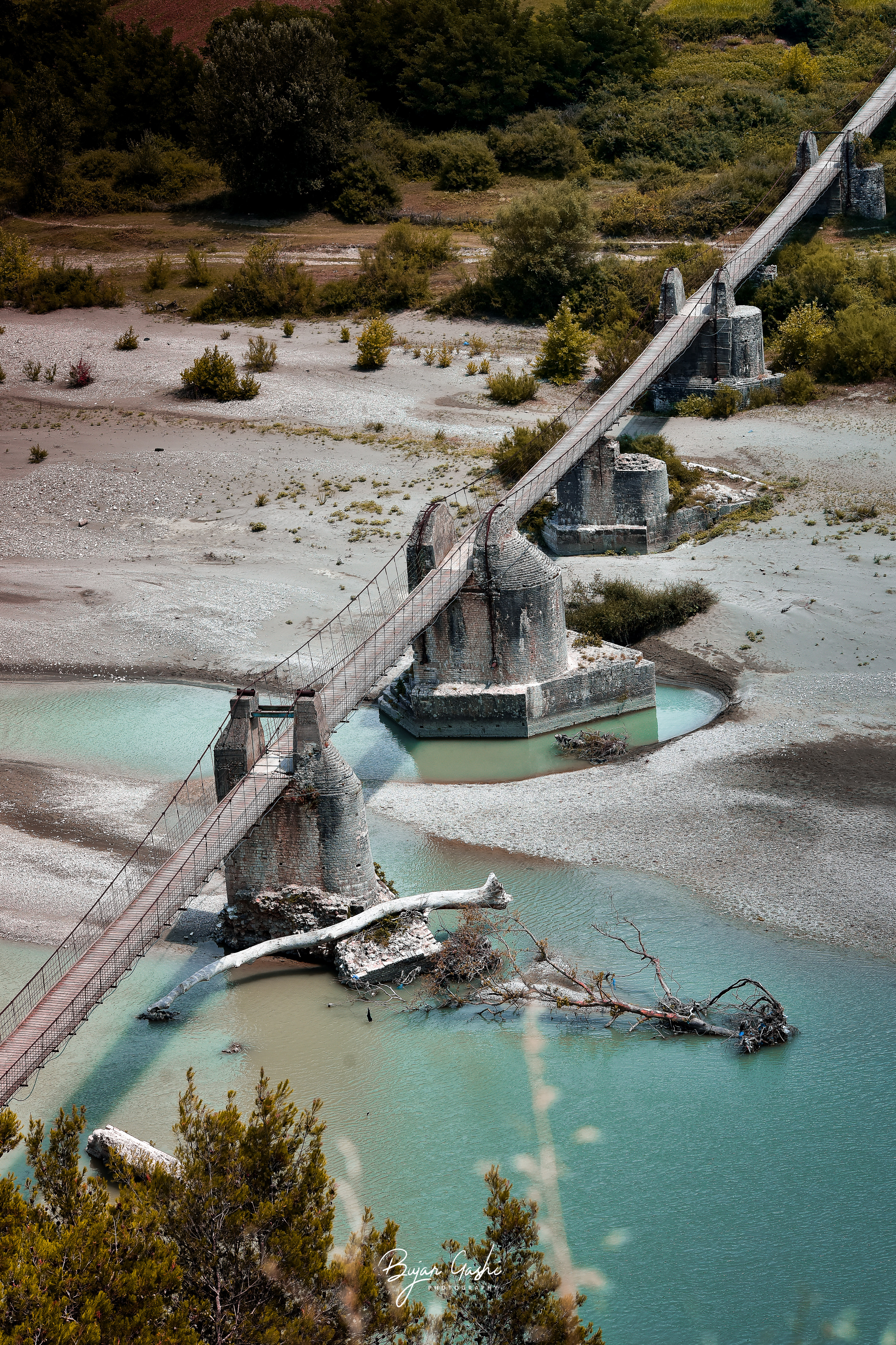 Rrënojat e Urës Antiko-mesjetare